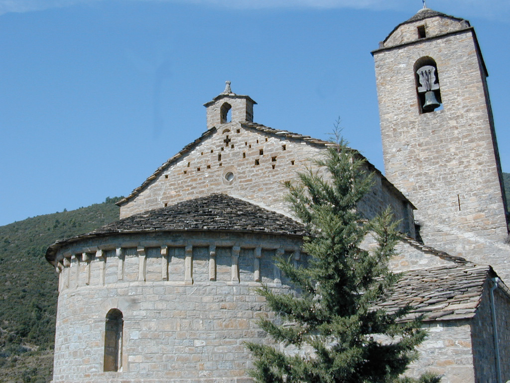 Abside de San Vicente de Labuerda